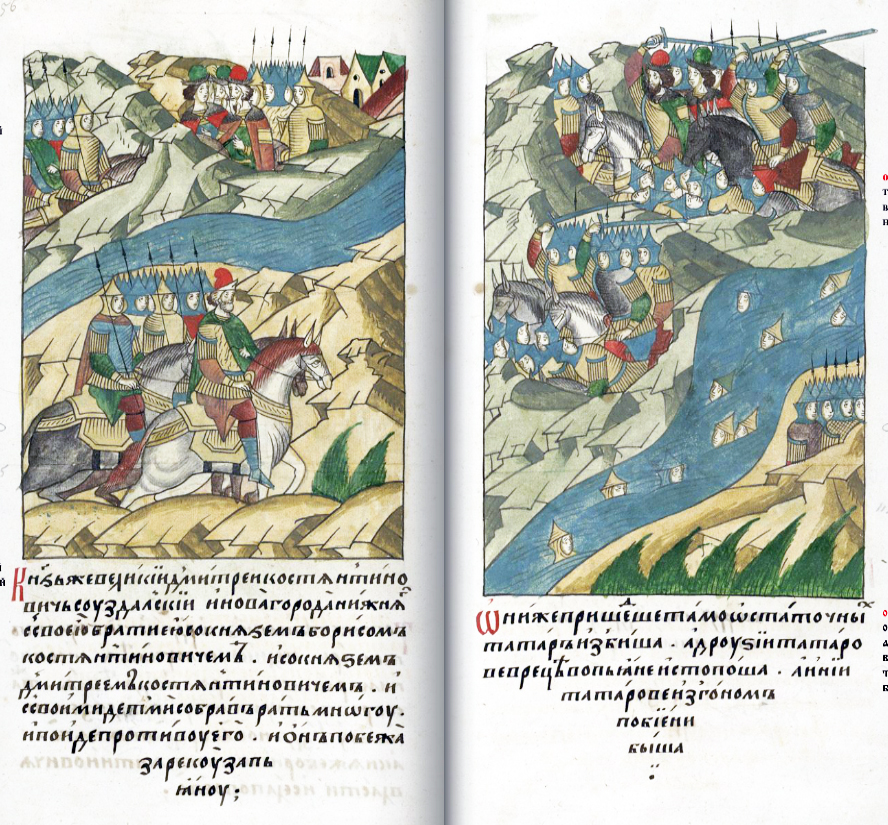 ЛИЦЕВОЙ ЛЕТОПИСНЫЙ СВОД Князь великий Дмитрий Константинович Суздальский и Нижнего Новгорода со своими братьями, с князем Борисом Константиновичем и князем Дмитрием Константиновичем, и со своими детьми, собрав большое войско, вышел против Ордынского князя. И бежал тот за реку Пьяну Они, придя туда, оставшихся татар побили, а других татар в реке Пьяне утопили, а иных набегом убили.